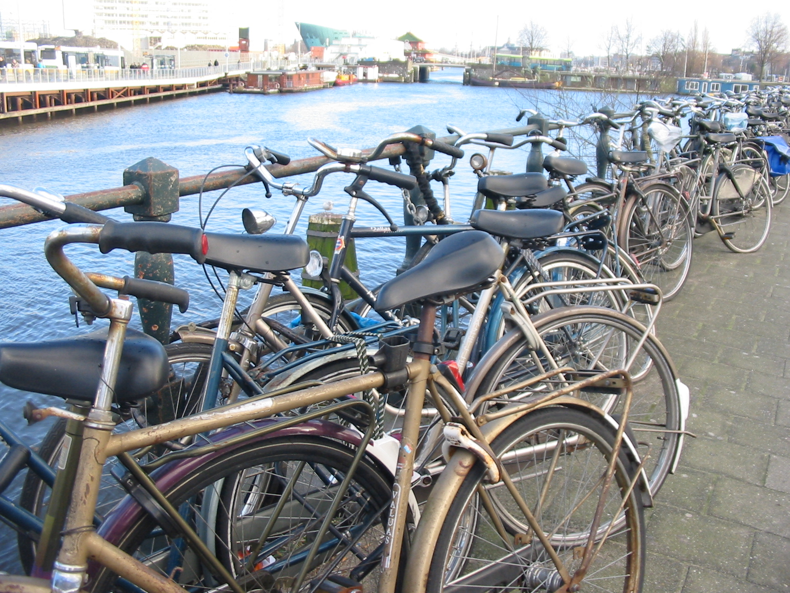 Het vastmaken van fietsen aan brugleuningen of straatmeubilair is meestal niet toegestaan. Deze fietsen lopen het risico verwijderd te worden en bij de AFAC terecht te komen. Nrf: Des bikes partchies.Bikes outside Central station